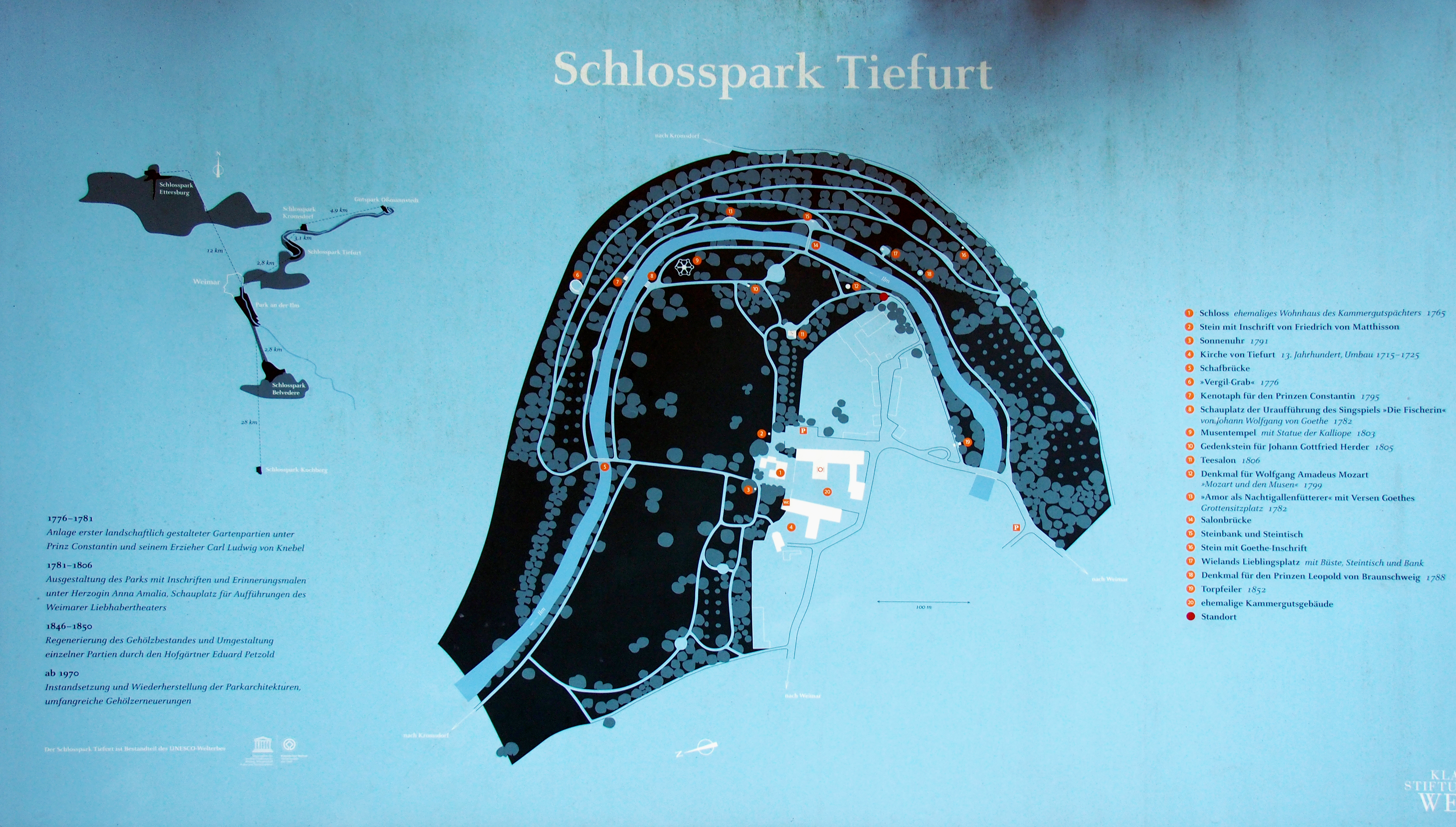 Plan des Schlossparks Tiefurt